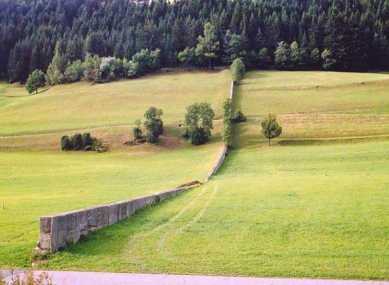 Fossato anti carro Versciaco